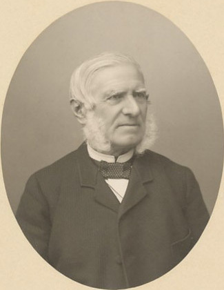 Ritratto di Pietro Bastogi, eseguito da Michele Schemboche, fine XIX secolo.